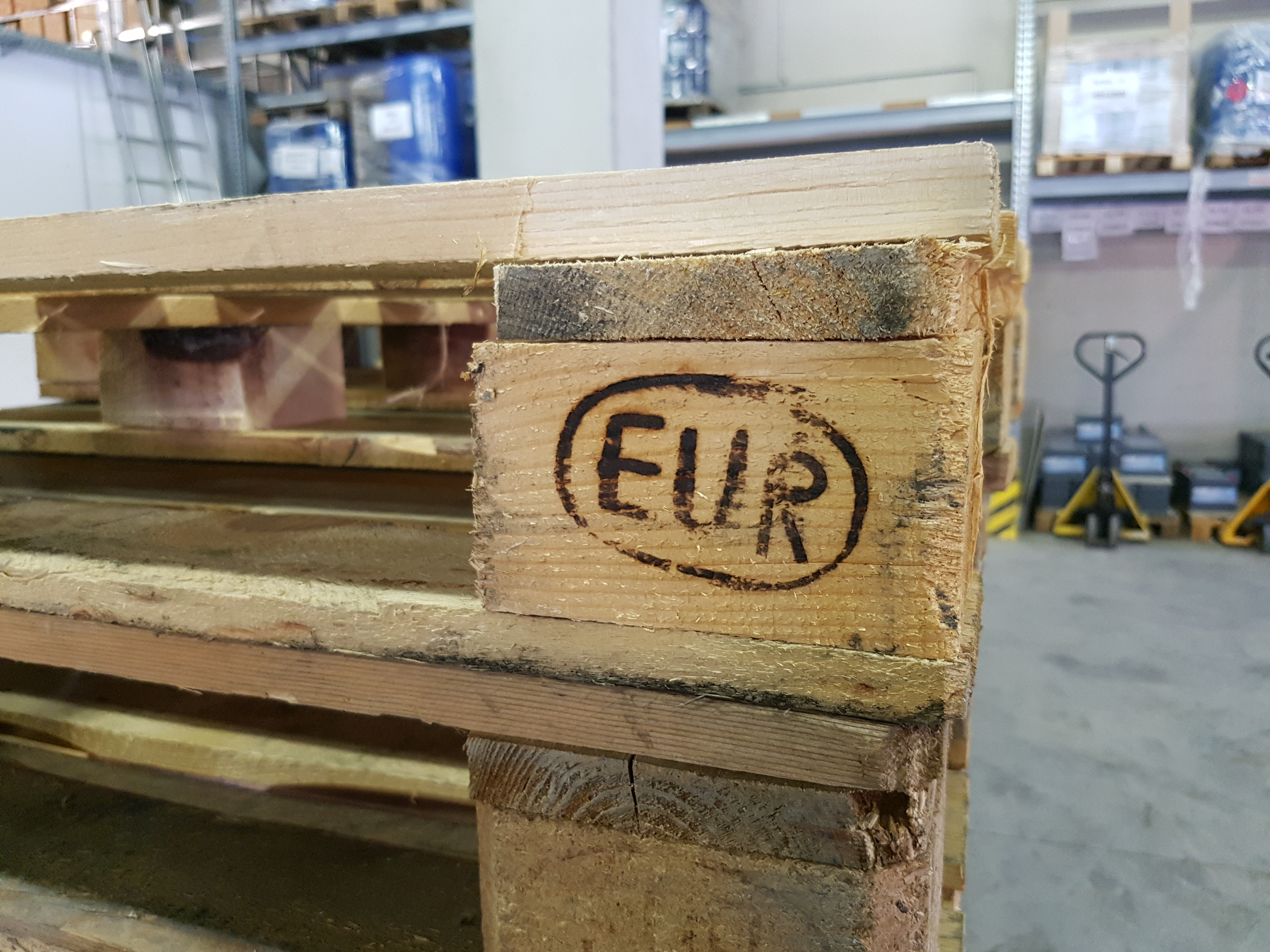 a obviously fake of the Europool branding "EUR"